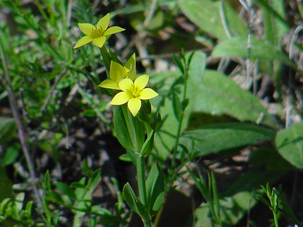 Petite-centaurée maritime (Centaurium maritimum)